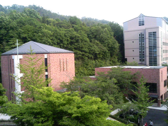 広島女学院大学内にある宗教センター、チャペル。